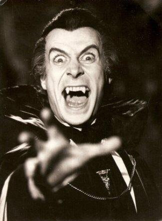 Gianni Lunadei interpretando al Conde Drácula, en una versión televisiva del año 1980.